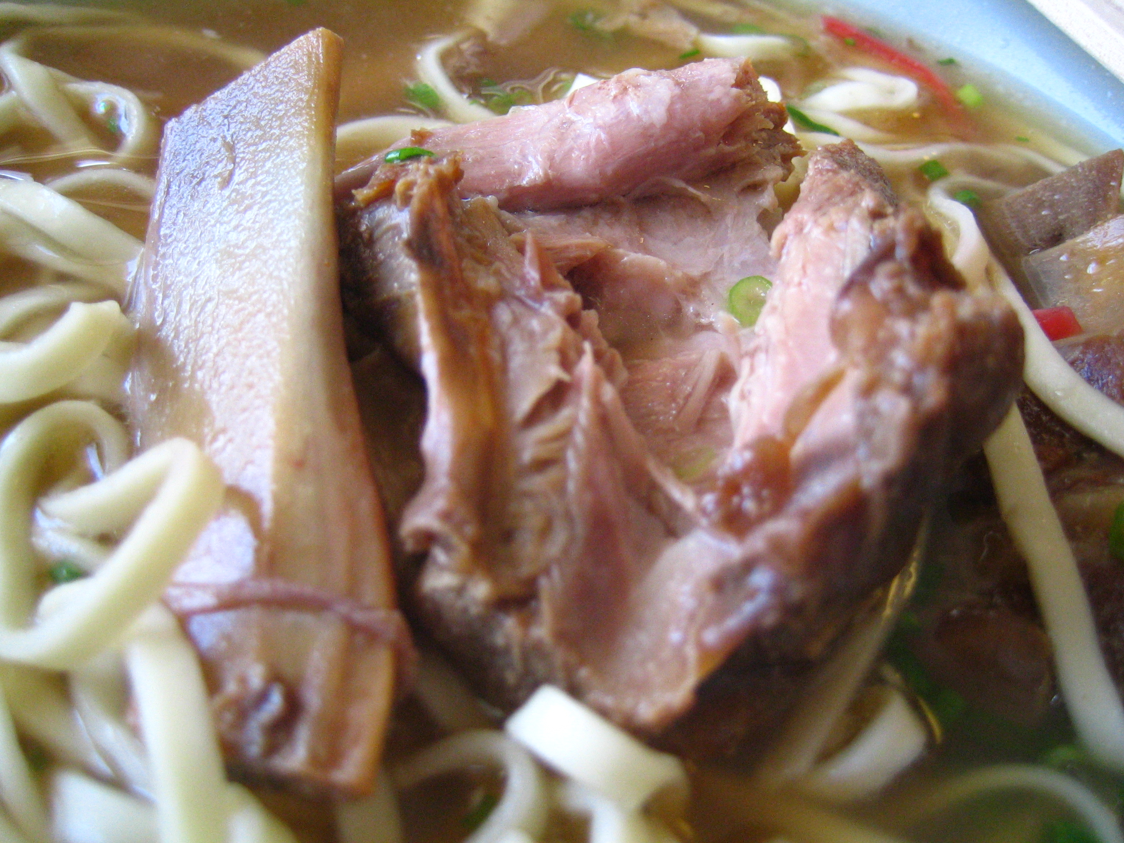 沖縄そば上のソーキ